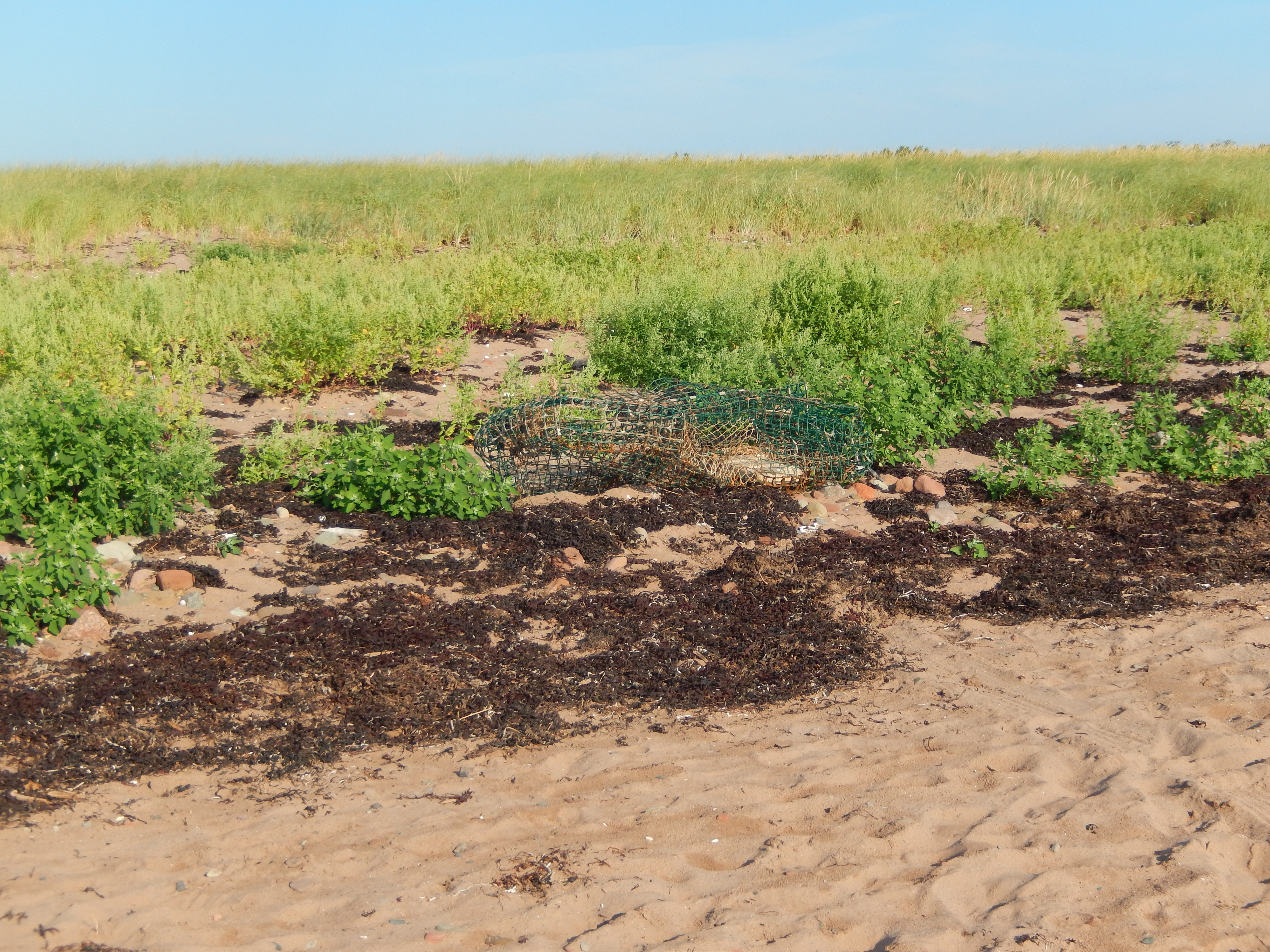 végétation derrière un plage